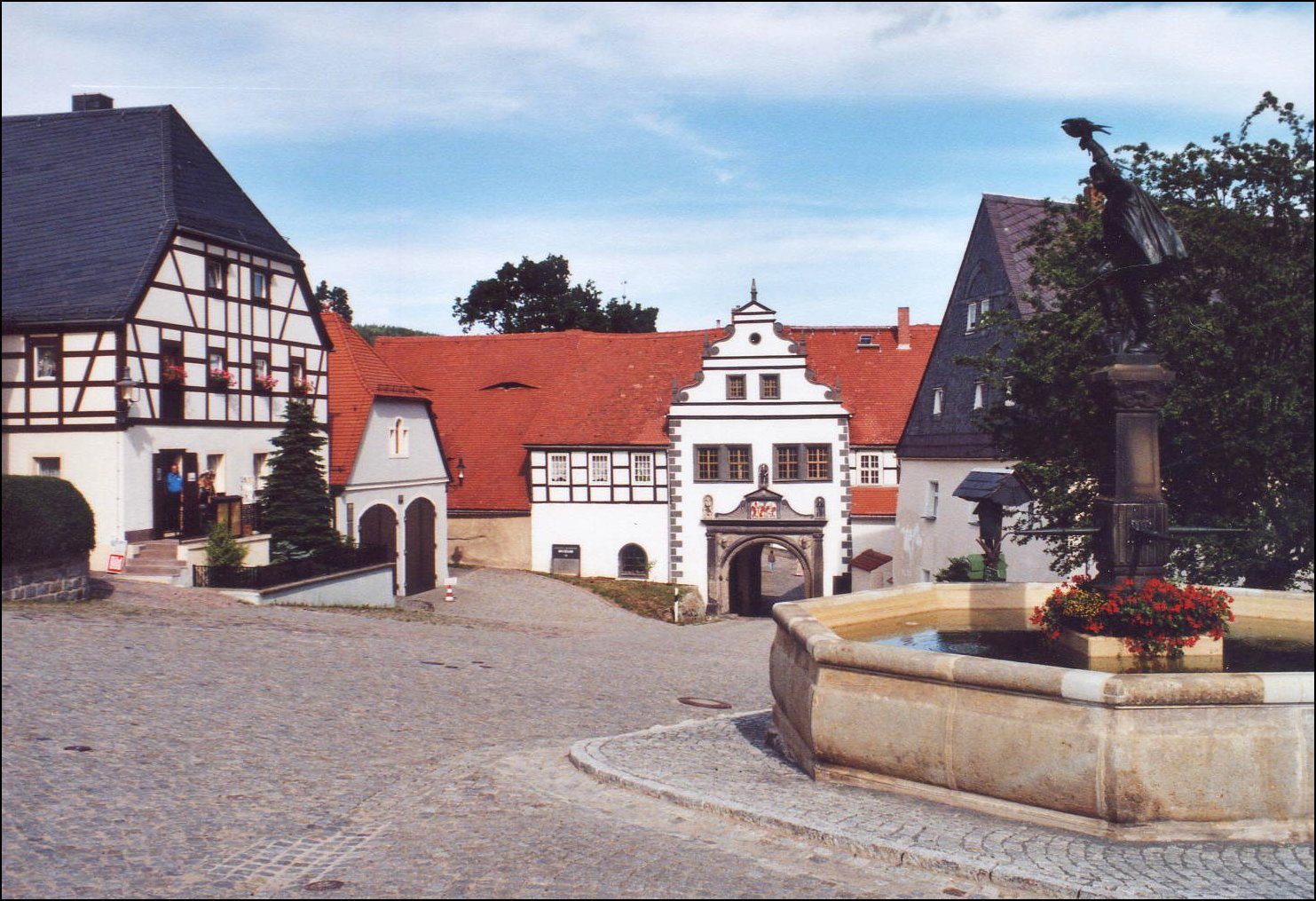 Lauenstein: Markt mit Falknerbrunnen und Schlossportal - Teil des Denkmalschutzgebiets Lauenstein.